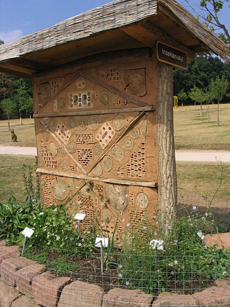 Nisthilfen-Wand auf der Gartenschau Kaiserslautern